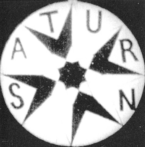 Logo der "Saturn-Film" wie es ab 1908 bis zuletzt (1910) verwendet wurde. Vergrößerung aus dem Vorspann zum Film "Das eitle Stubenmädchen"